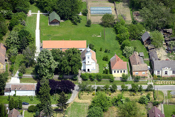 Légi fotó